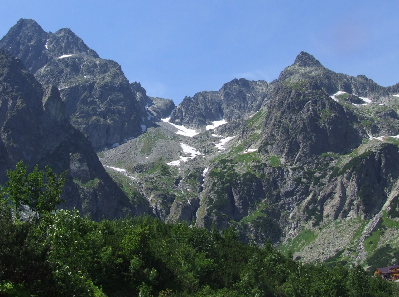 Dolina Dzika. U góry p o lewej stronie Durny Szczyt i Mały Durny Szczyt, po prawej stronie Doliny Jastrzębia Grań i Dolin a Jastrzębia, u dołu doliny próg skalny z wodospadami.